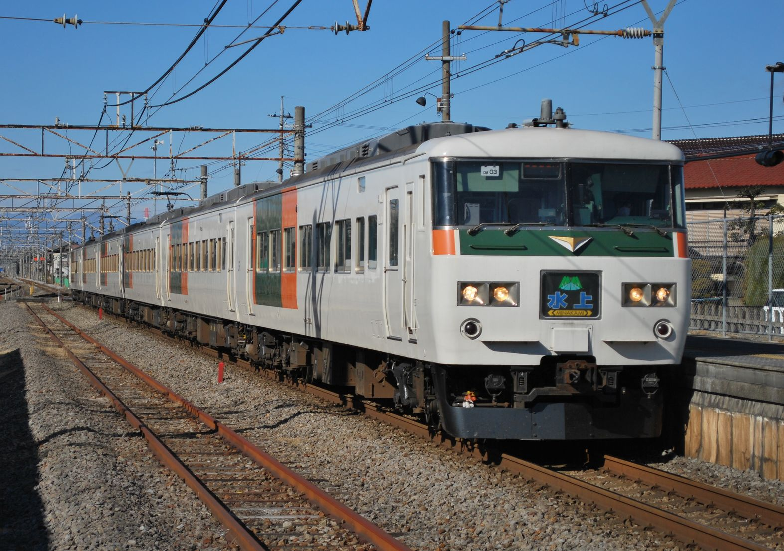 臨時列車化された特急水上。グリーン車なしの6両編成で運行。新町駅にて撮影。